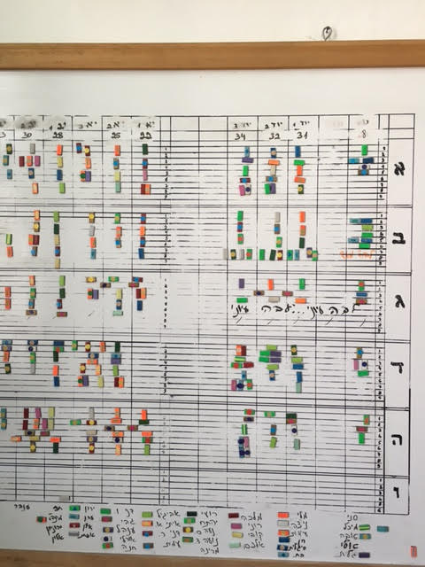 שיבוץ חזותי של מורים לכיתות בחדר המורים- בי"ס תיכון בתל-אביב